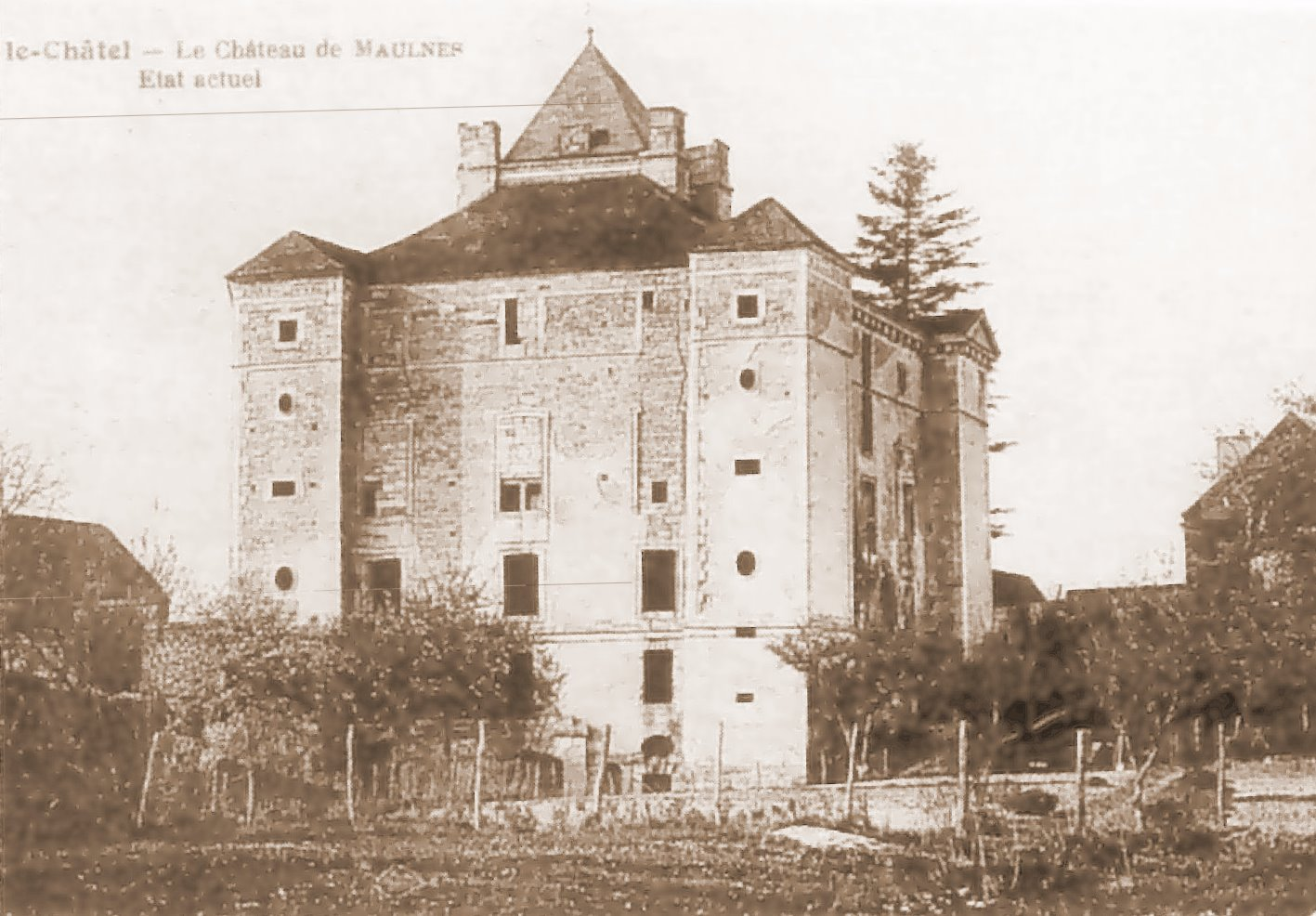 Château de Maulnes, Cruzy-le-Châtel, Yonne